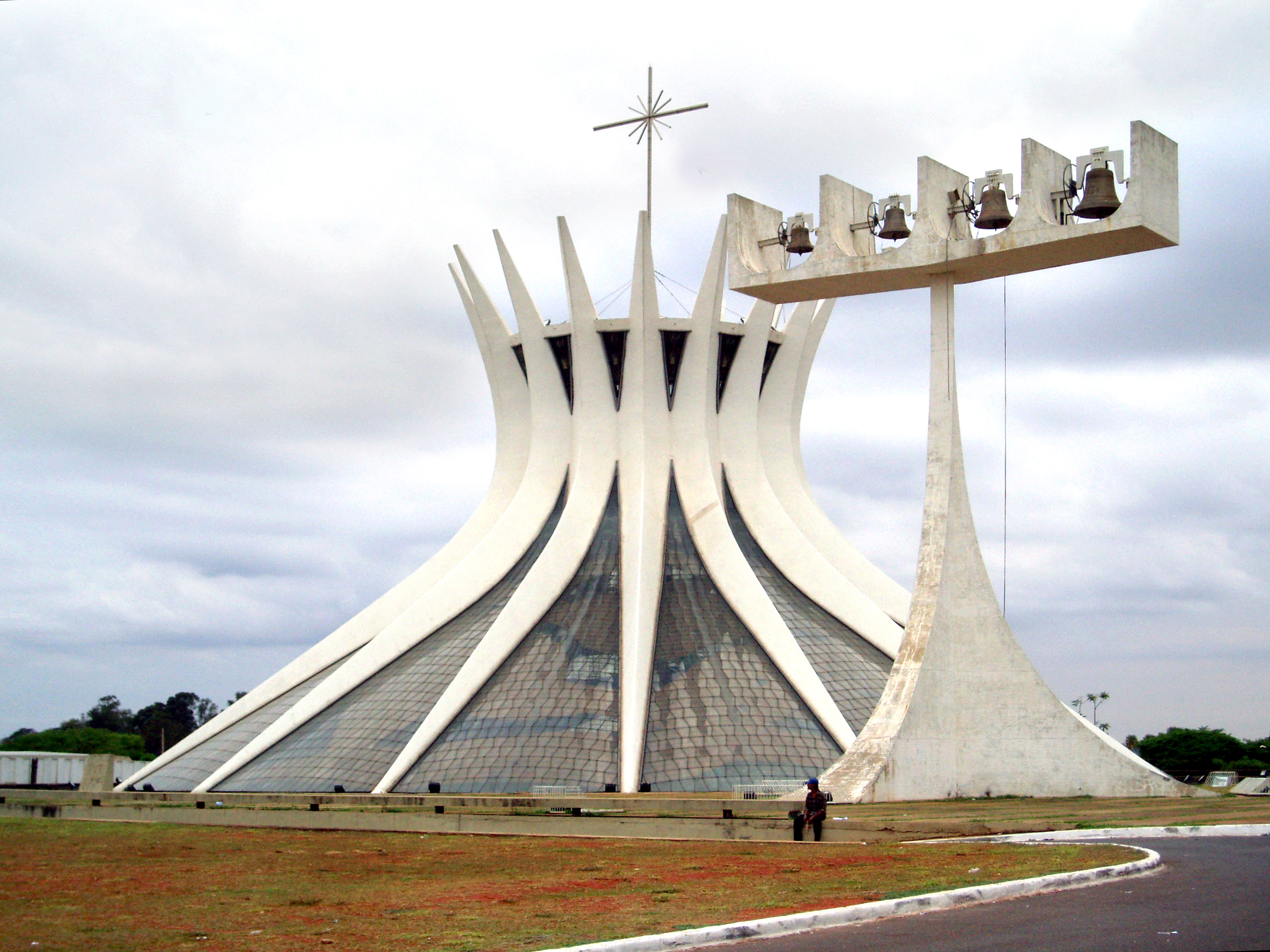 Catedral de Brasilia, Brasil